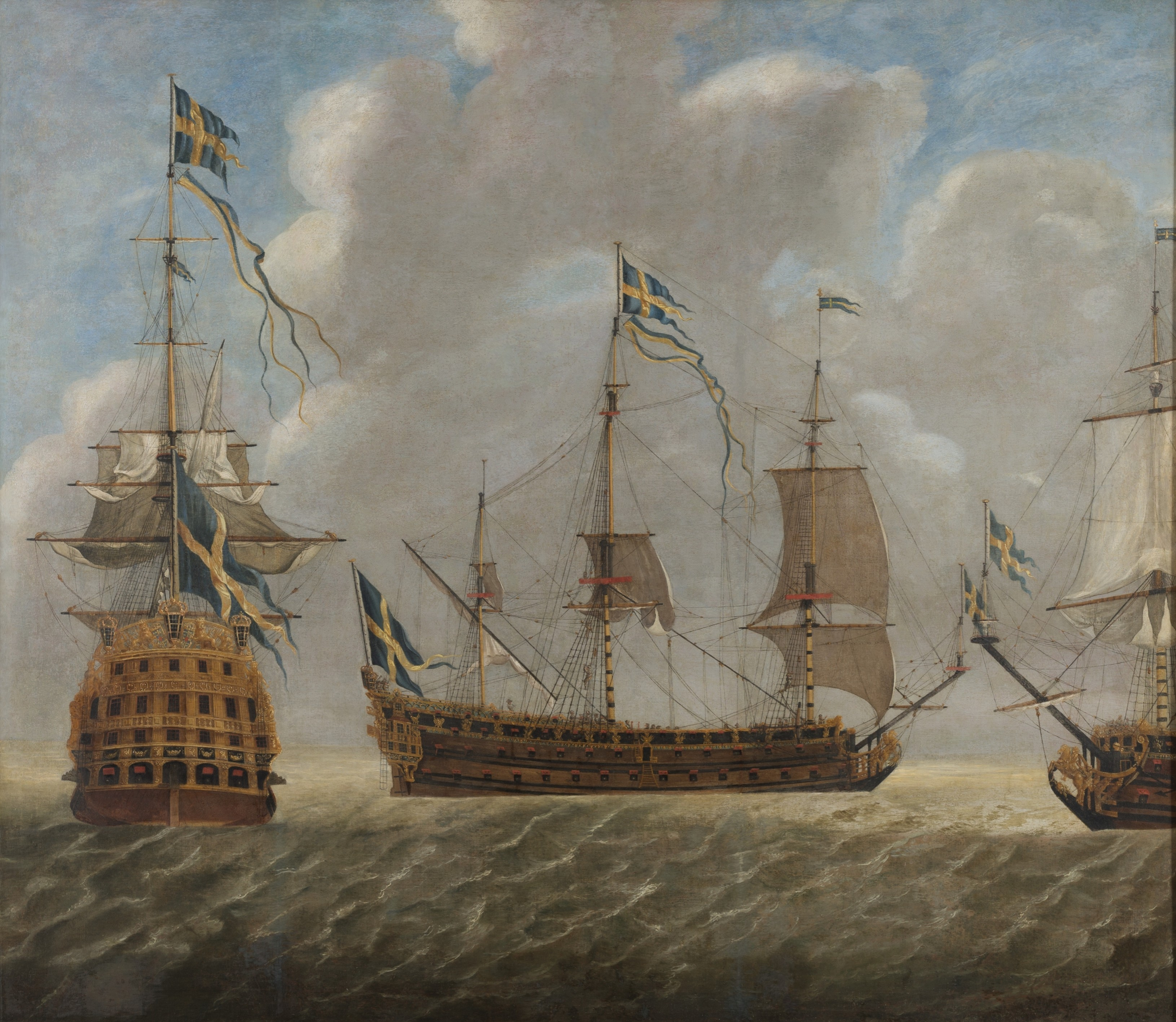 Oljemålning av linjeskeppet Konung Karl, sjösatt 1694. Marinmuseum, Karlskrona.